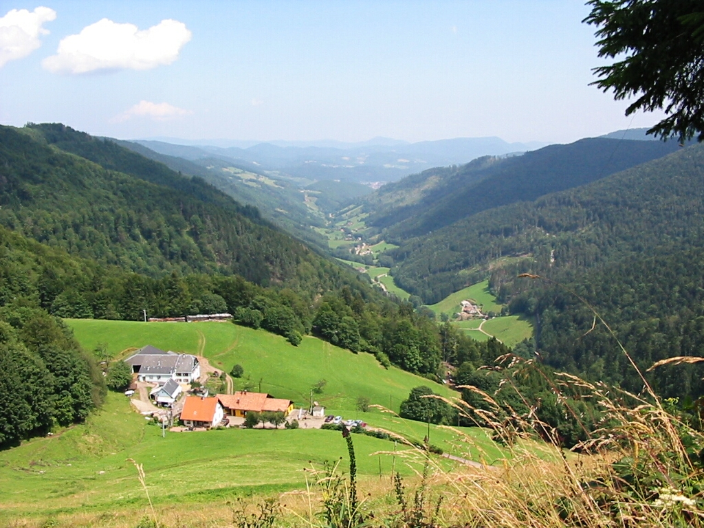 Haute vallée de la Liepvrette Rivière du Haut-Rhin, en Alsace, sur la commune de Sainte-Marie-aux-Mines Photographie personnelle prise le 27 juillet 2005, entre le col des Bagenelles et le col du Pré de Raves.